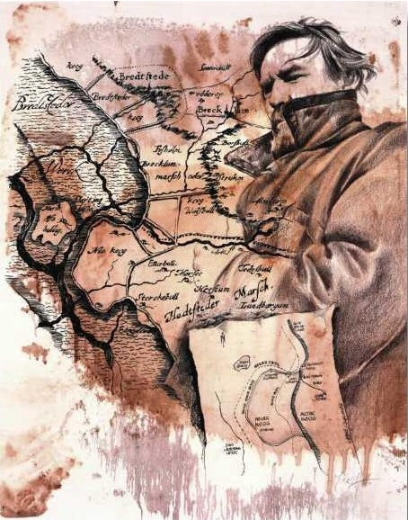 Illustration zur Kooggewinnung / Schimmelreiter